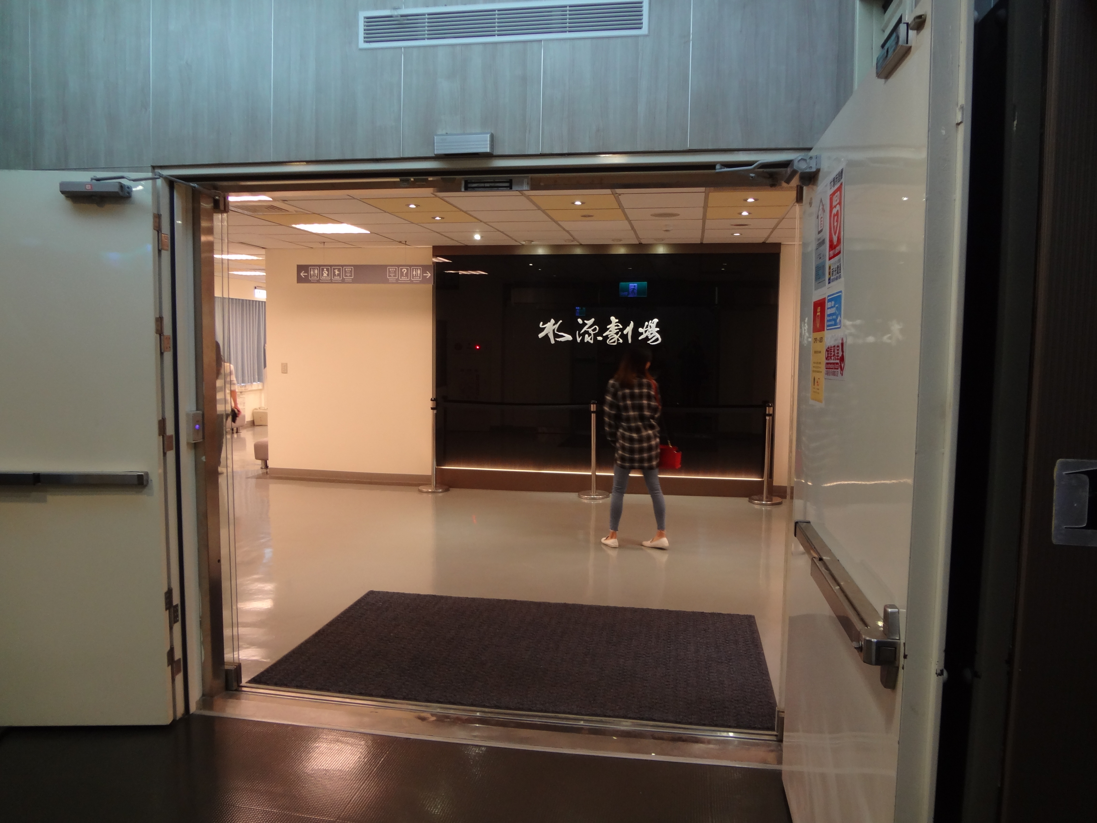 臺北市水源大樓10樓，水源劇場入口。